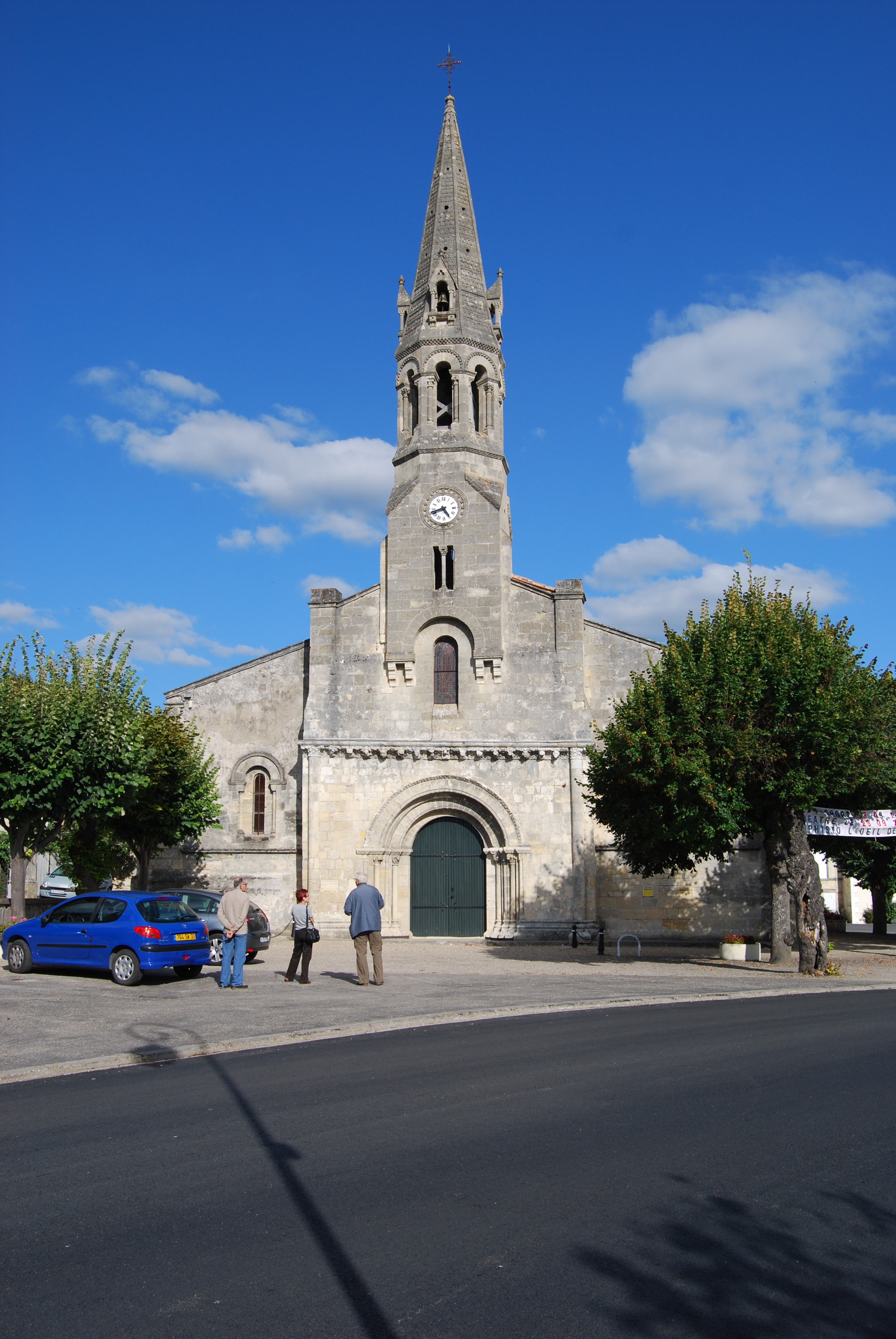 Église Saint-Martin de Cambes, (Inscrit, 2001) .